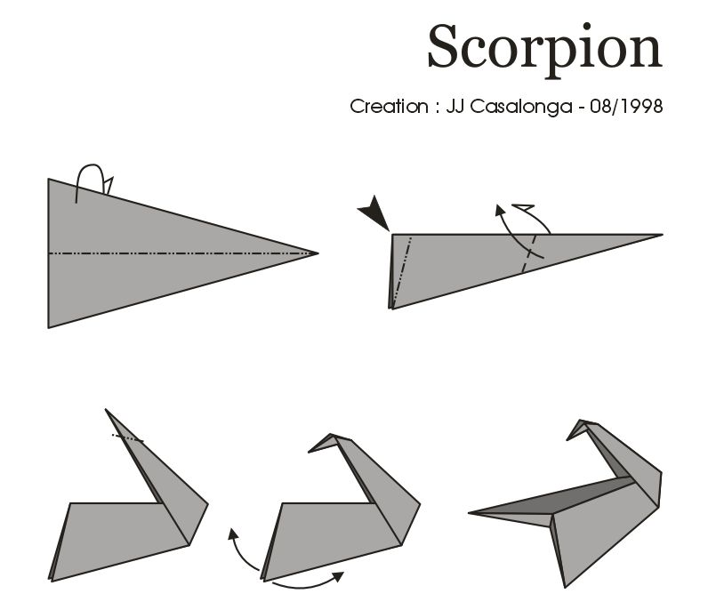 Scorpion réalisé en 4 plis - Créateur : JJ Casalonga